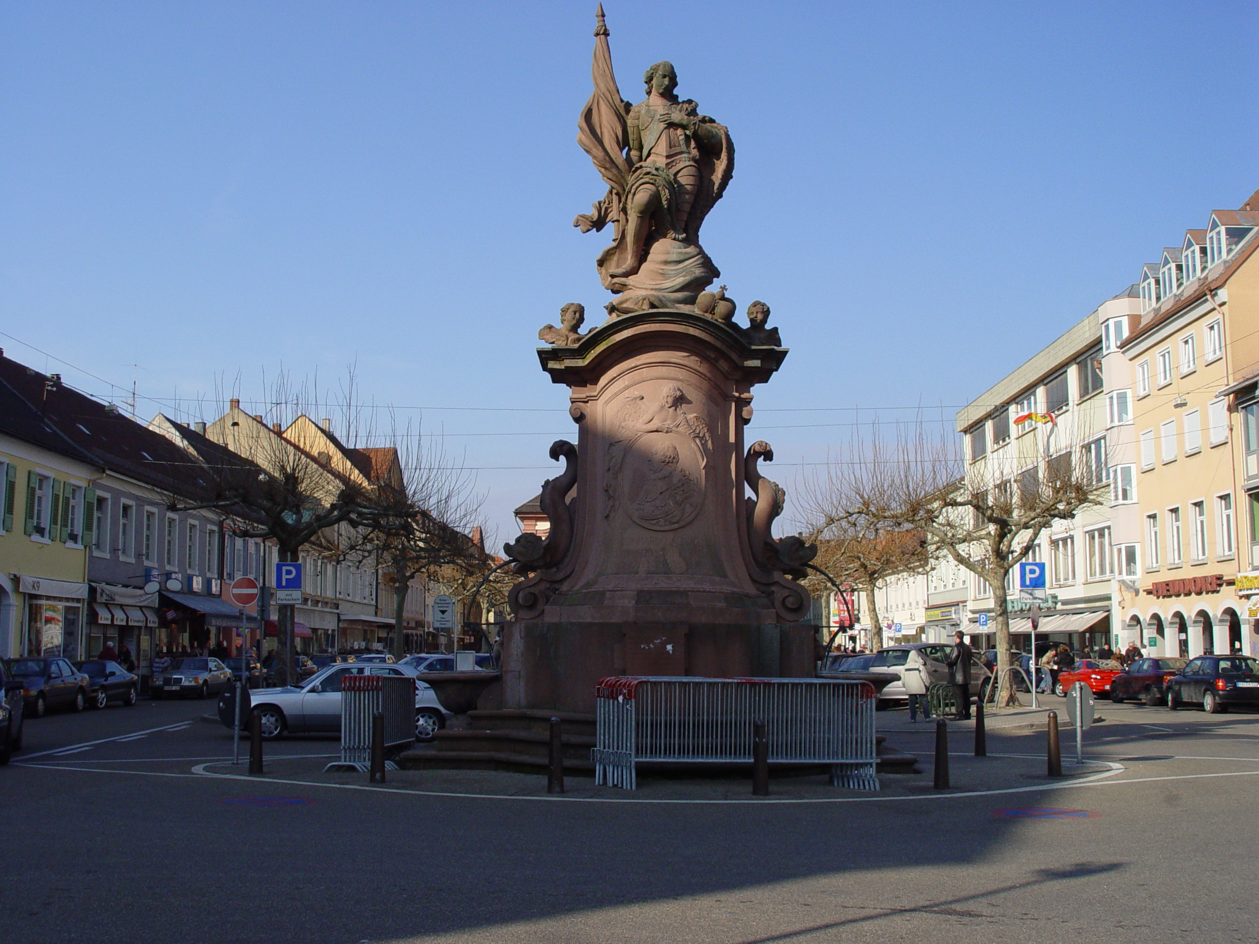 Der Bernhardusbrunnen in Rastatt.